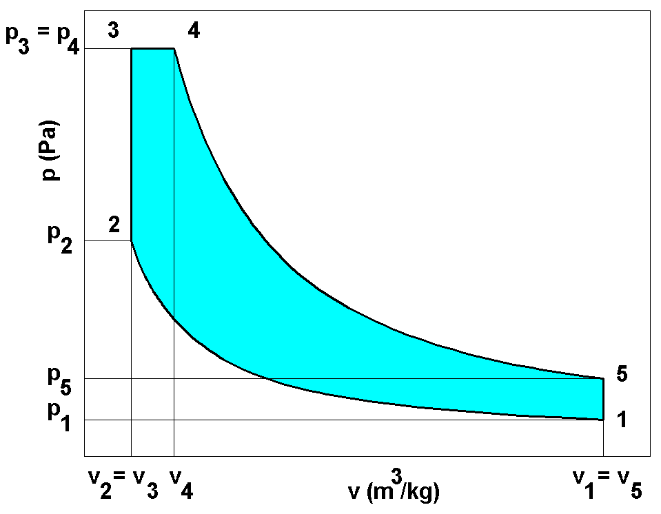 Seiliger-, Sabatier-, kevert vagy kettős ciklus a p-v diagramban.